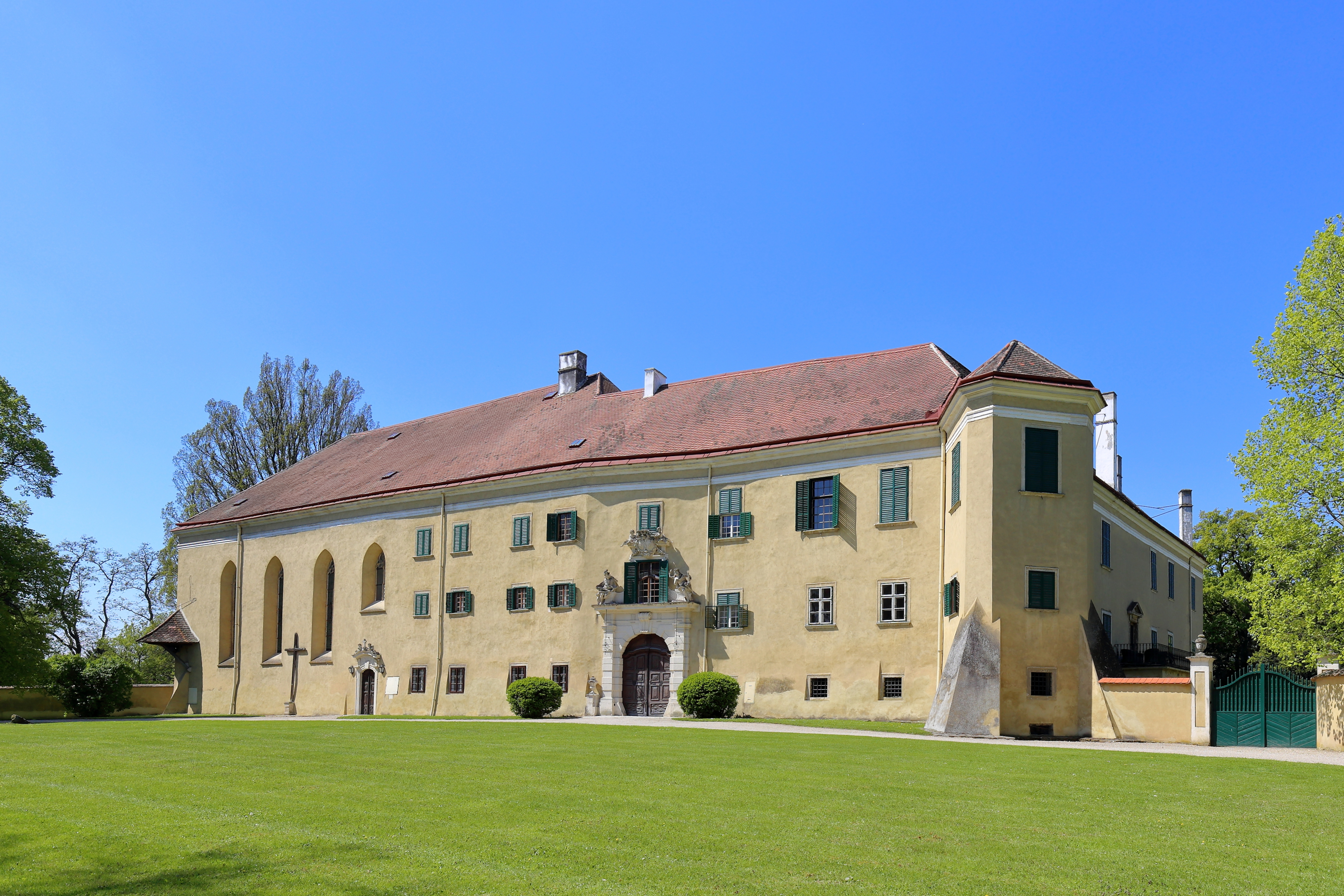 Nordostansicht des Schlosses in der niederösterreichischen Marktgemeinde Sierndorf.Eine vierflügelige, dreigeschossige Anlage mit Eckrisaliten um einen Rechteckhof, die Anfang des 16. Jahrhunderts errichtet wurde und um 1730 umgebaut wurde. In der Südostecke befindet sich die spätgotische Schlosskapelle, die seit 1783 auch Pfarrkirche des Ortes ist.